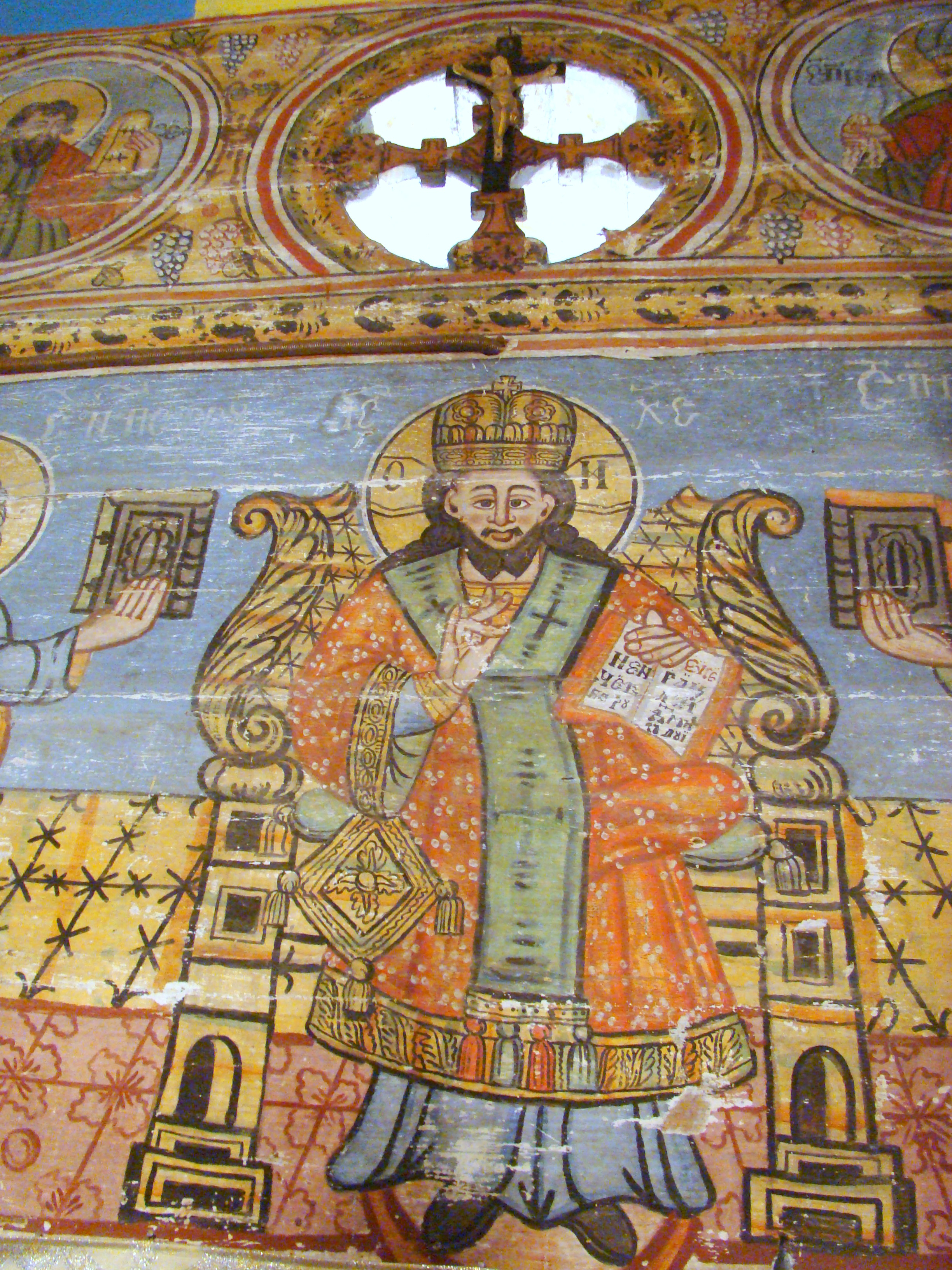 Biserica de lemn „Sfinții împărați Constantin și Elena” din Bârlești, județul Alba